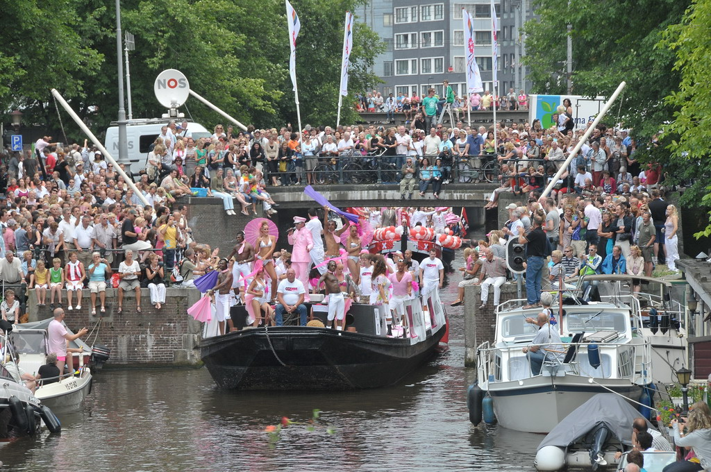 Принсенграхт во время проведения гей-парада в Амстердаме